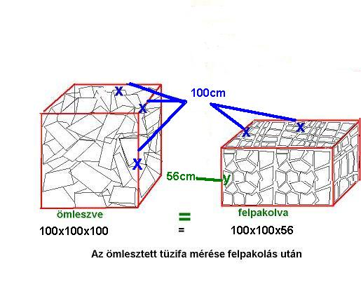 Űrköbméter vagy üzemi köbméter